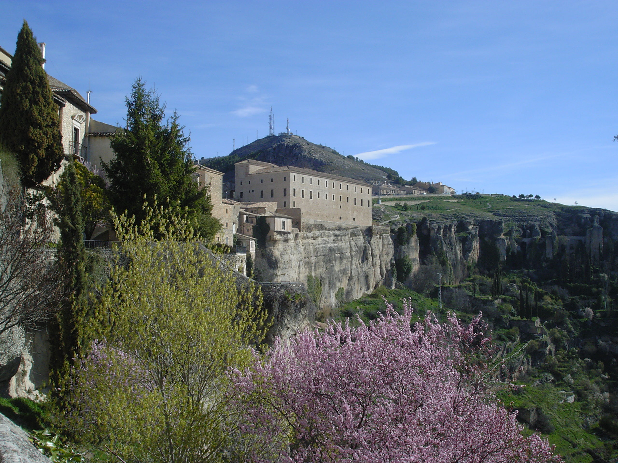 Vista del Archivo Histórico Provincial de Cuenca desde la ronda Julián Romero.